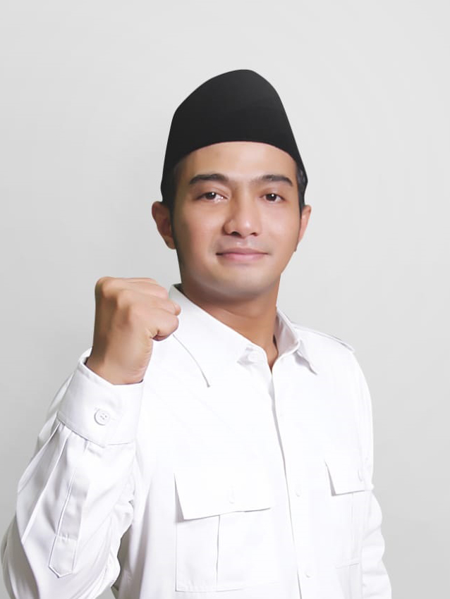 Ahmad Syawqi adalah Kader Partai Gerindra (Gerakan Indonesia Raya) yang berasal dari Kota Tangerang Selatan